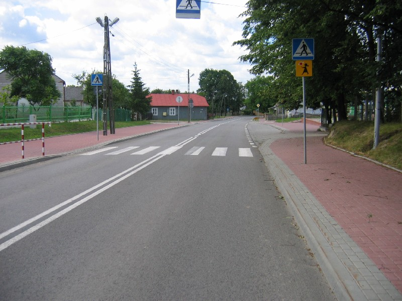 Centrum Frampola